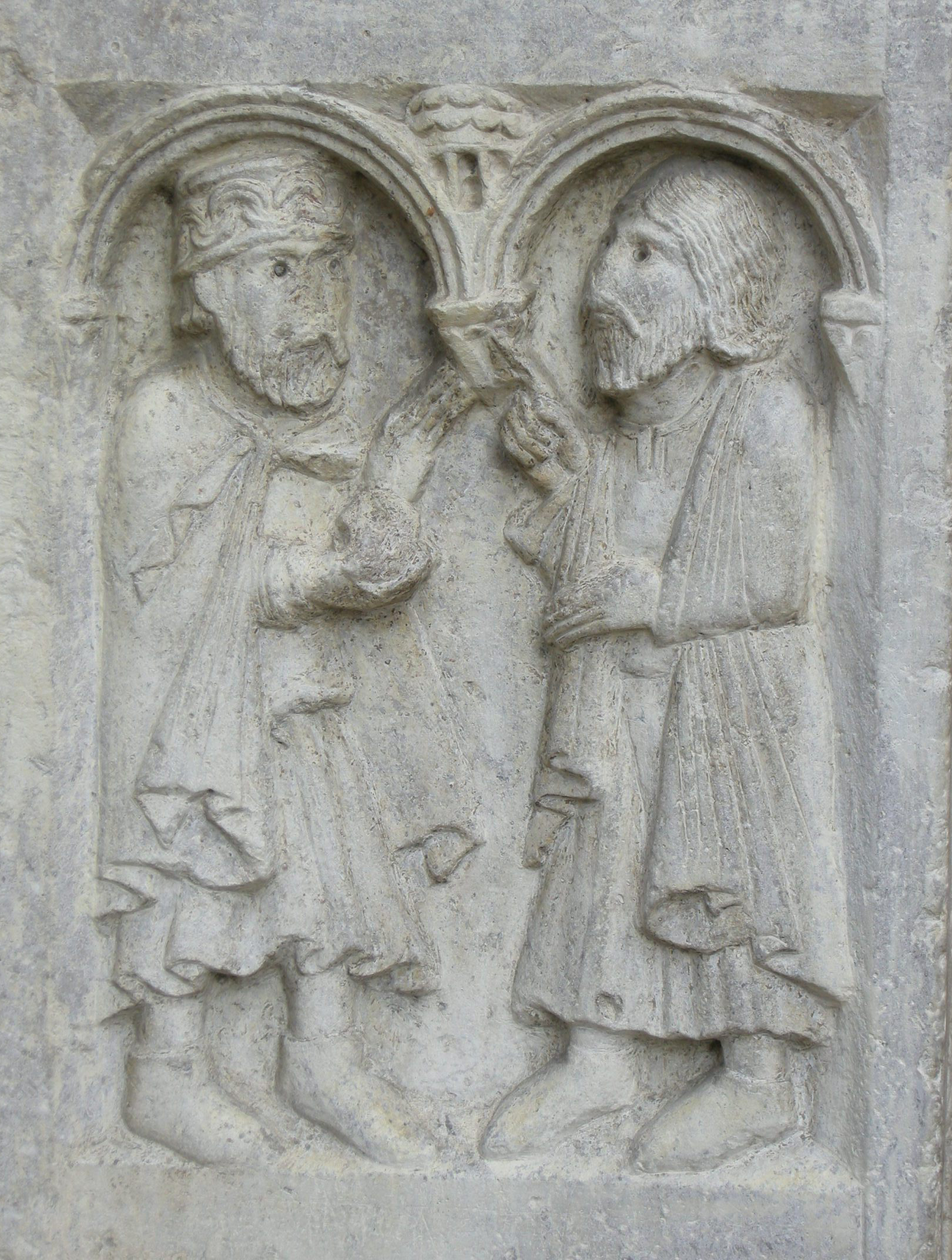 Abbazia di nonantola, portale di seguaci wiligelmo, stipite sx, formella 03 re astolfo fa la donazione ad anselmo